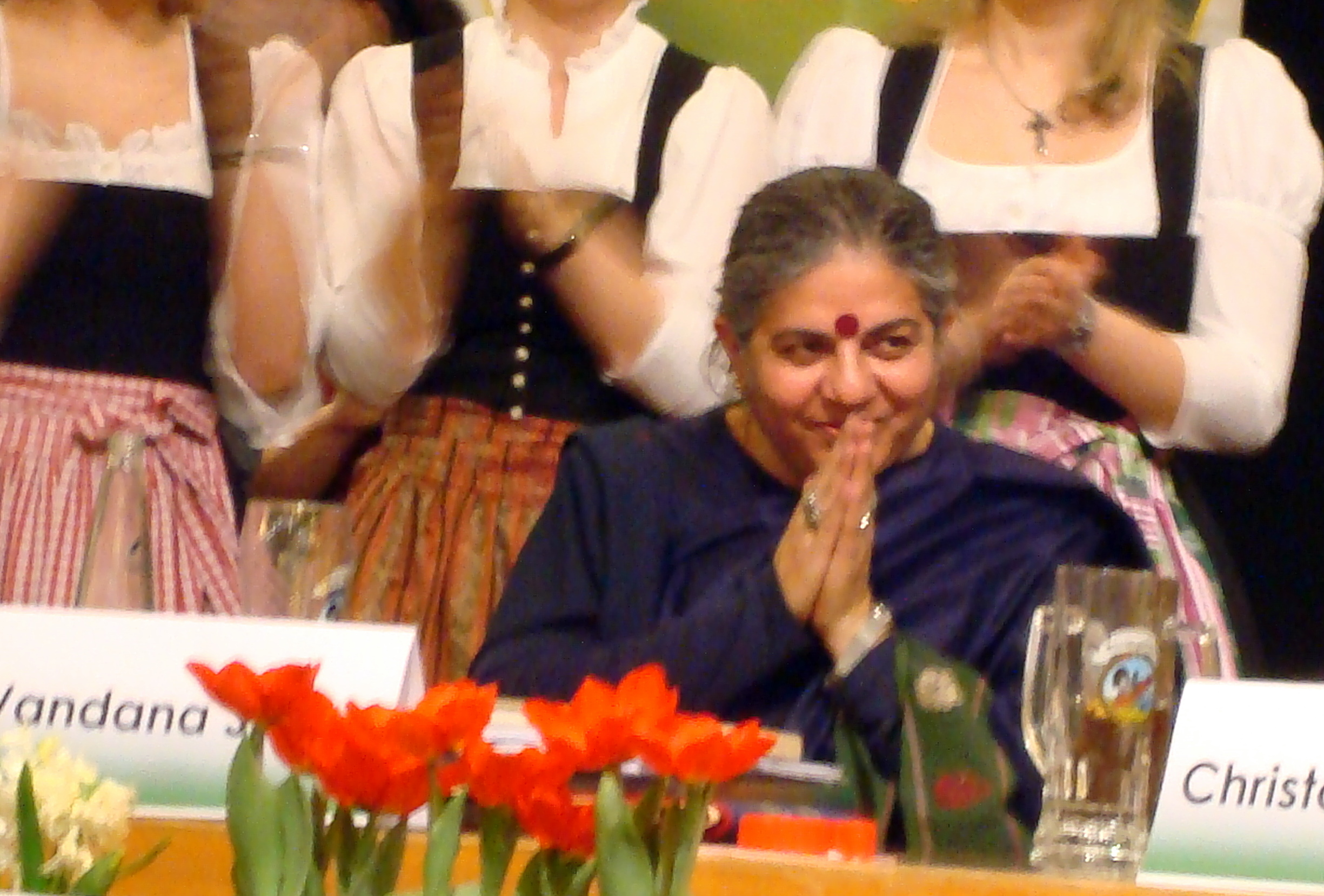 Dr. Vandana Shiva at Rosenheim, Bavaria